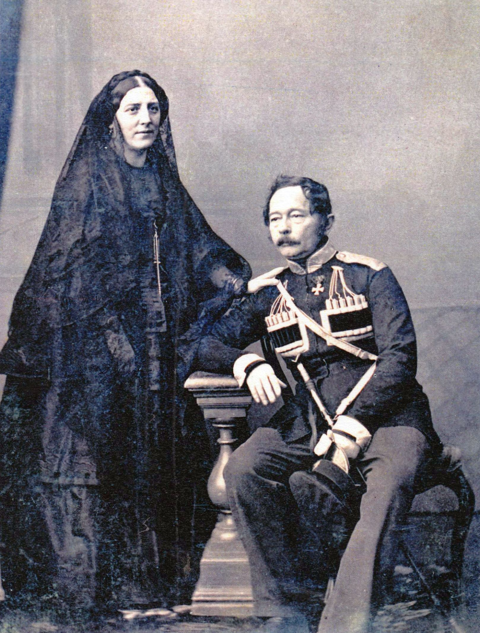 Екатерина Николаевна и Николай Николаевич Муравьевы-Амурские. Западная Европа, 1860 г. Из фондов Государственного исторического музея. Книга: Дубинина Н. И. Николай и Екатерина Муравьевы-Амурские. Историко-документальное повествование. – Хабаровск: КГБНУК ХКМ им. Н. И. Гродекова, 2014. – 260 с.